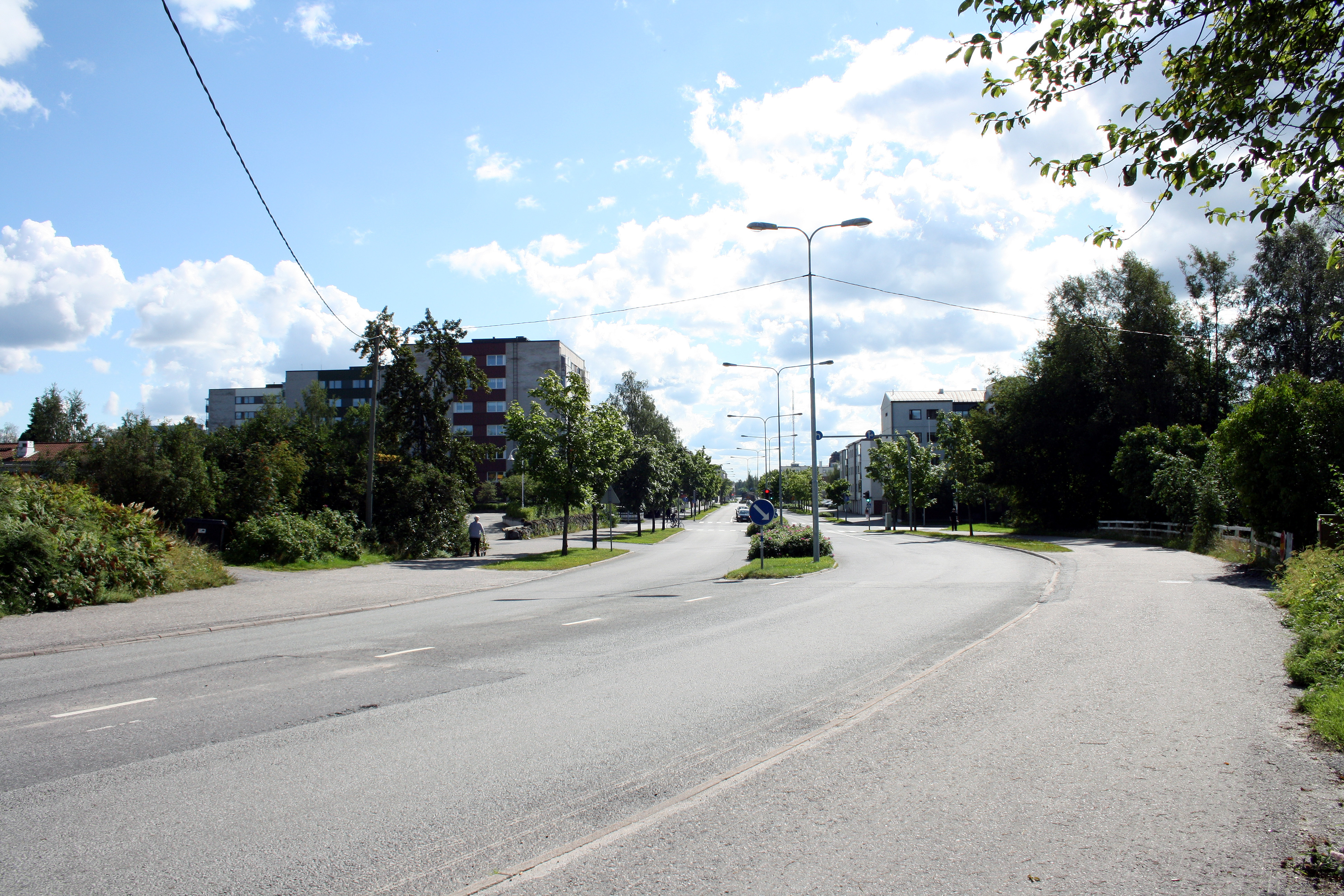 Kaarlelankatu Kokkolassa.